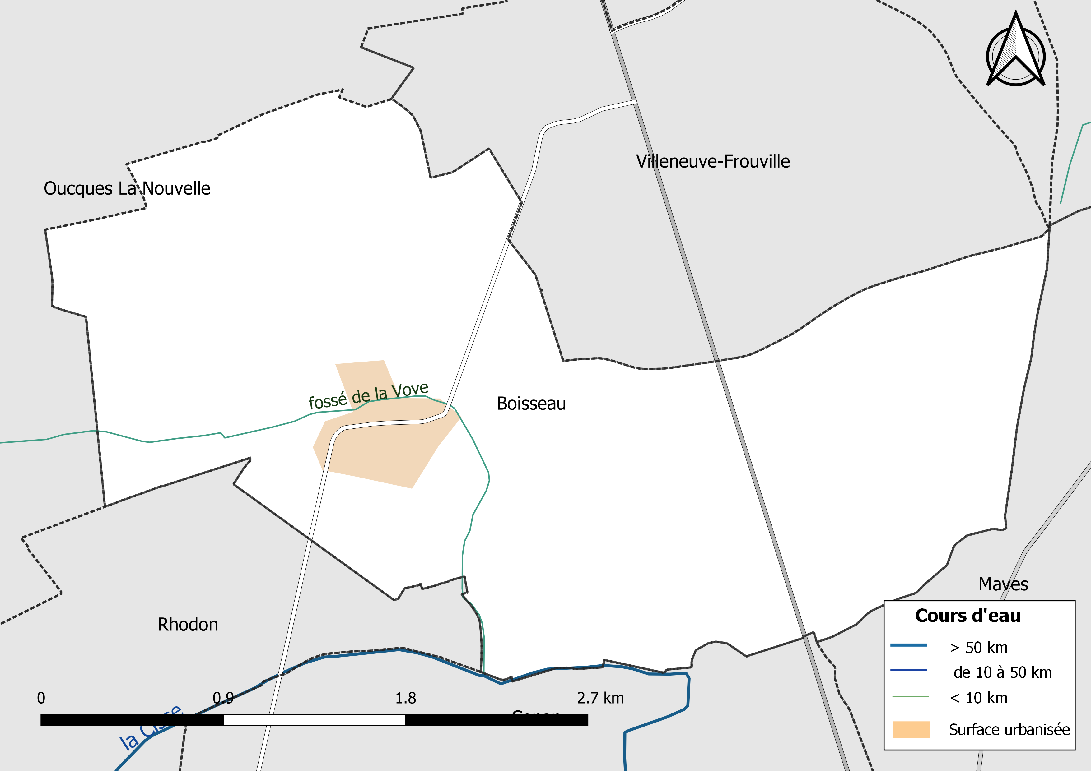 Carte du réseau hydrographique de la commune de Boisseau (Loir-et-Cher) (France).